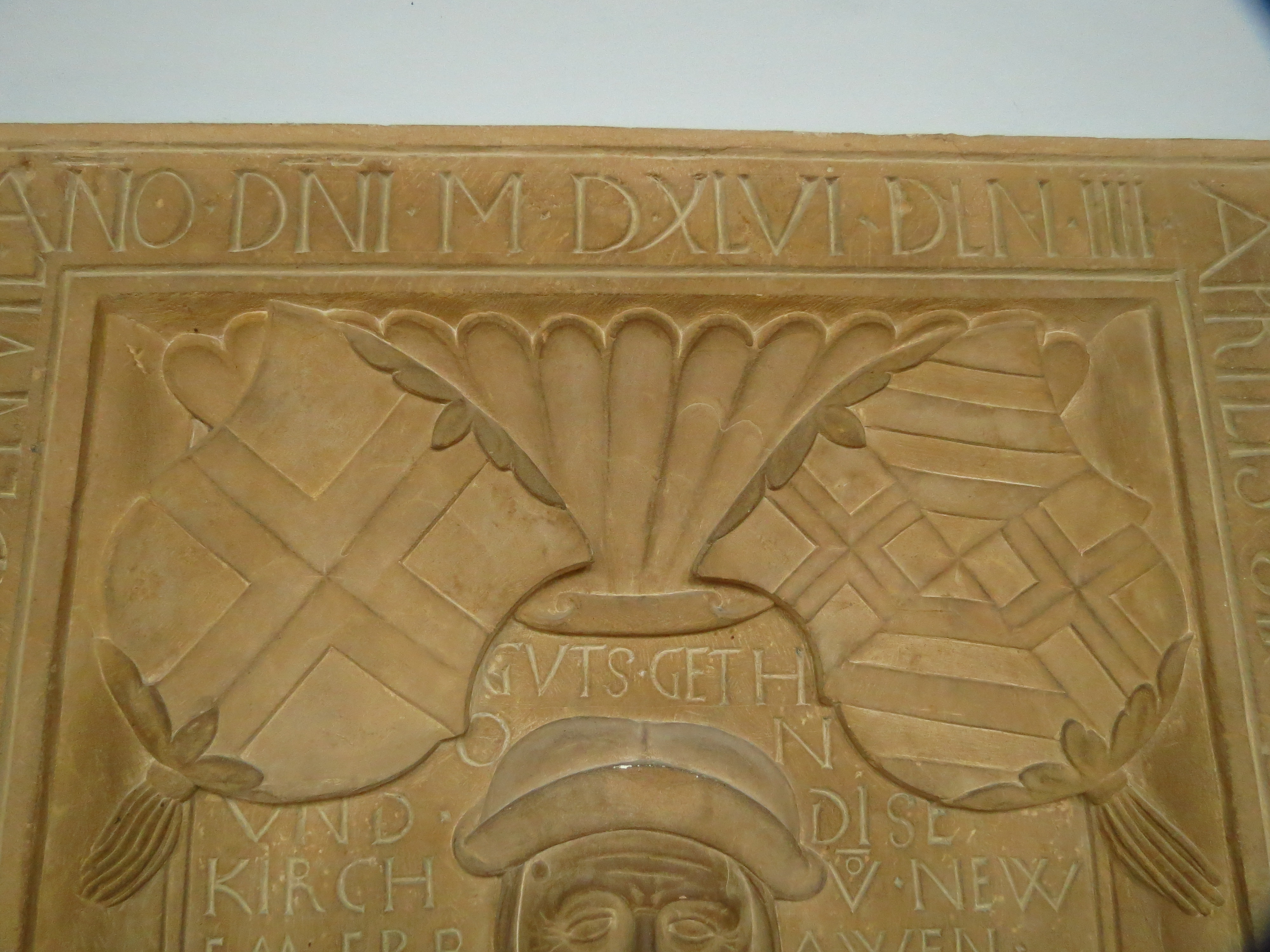 Kopf der Grabplatte des Großpriors Johann von Hattstein in der Bartholomäus-Kirche in Heitersheim, Landkreis Breisgau-Hochschwarzwald, Baden-Württemberg